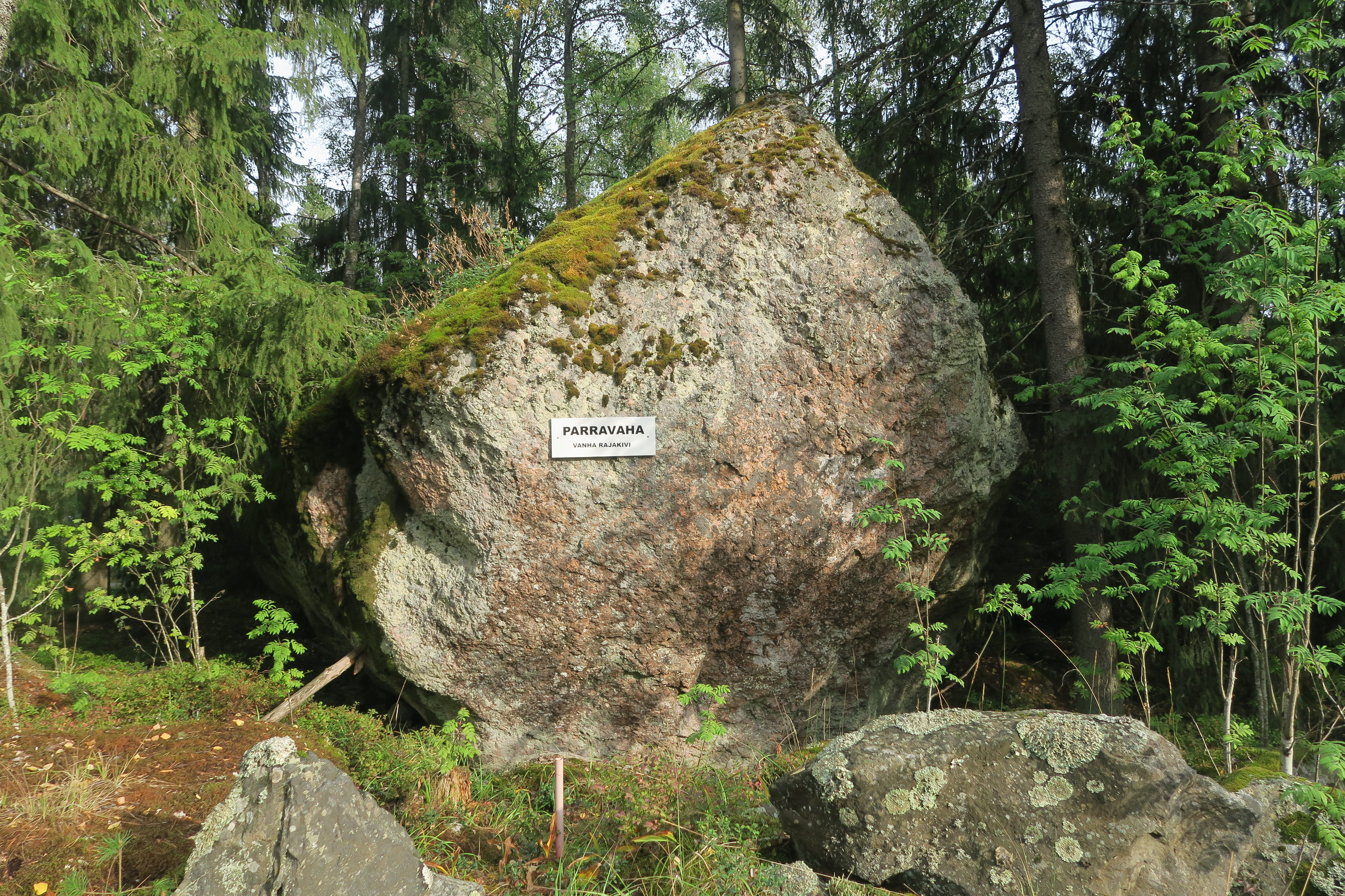 Parravahan (myös Parranvaha) rajakivi Pöytyän, Marttilan ja Loimaan kuntien rajalla, aiemmin Karinaisten, Pöytyän, Marttilan ja Mellilän kuntien rajalla, myös Varsinais-Suomen ja Satakunnan historiallisten maakuntien rajalla.